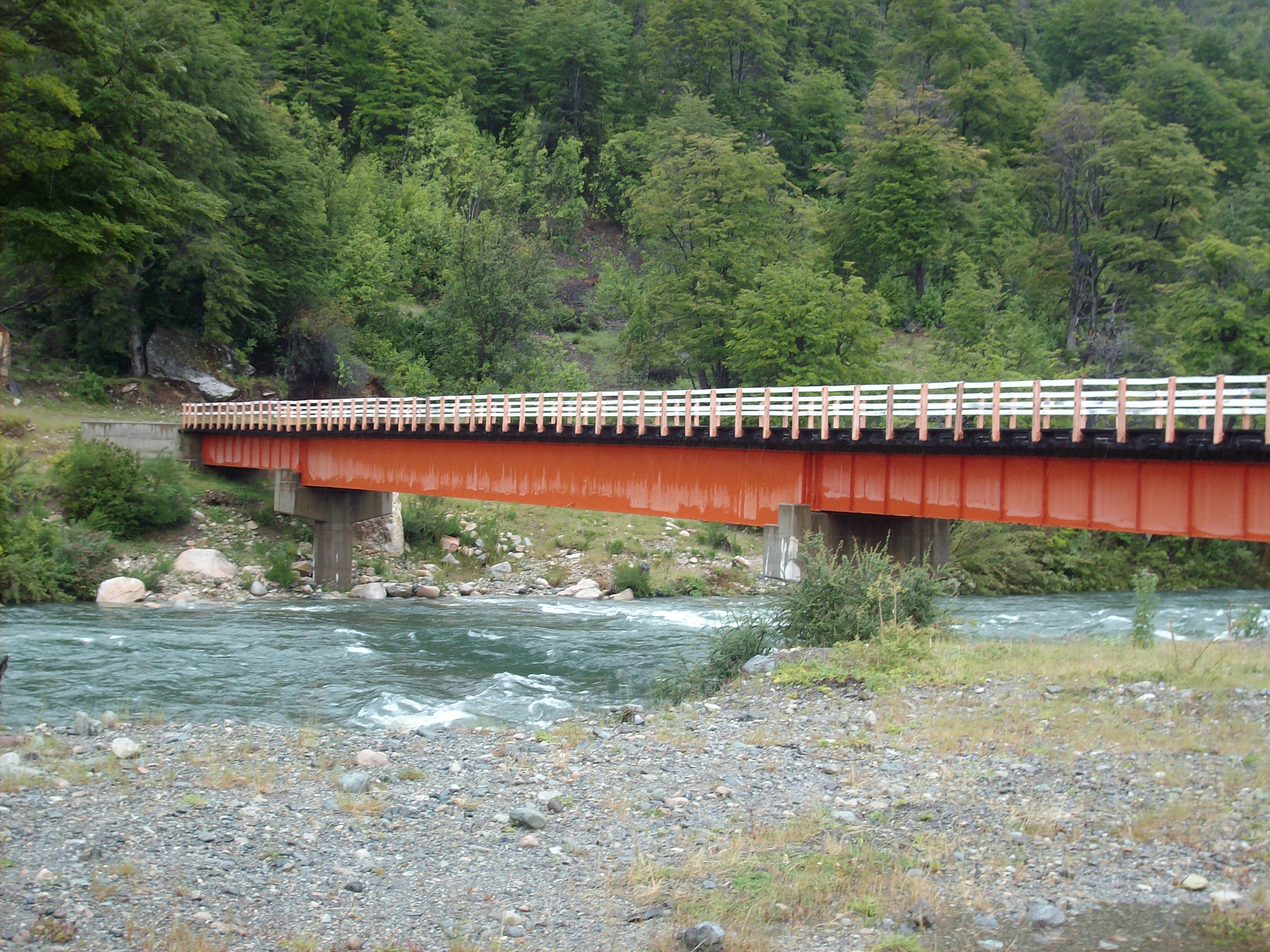 Rio Tigre, Palena, Chile